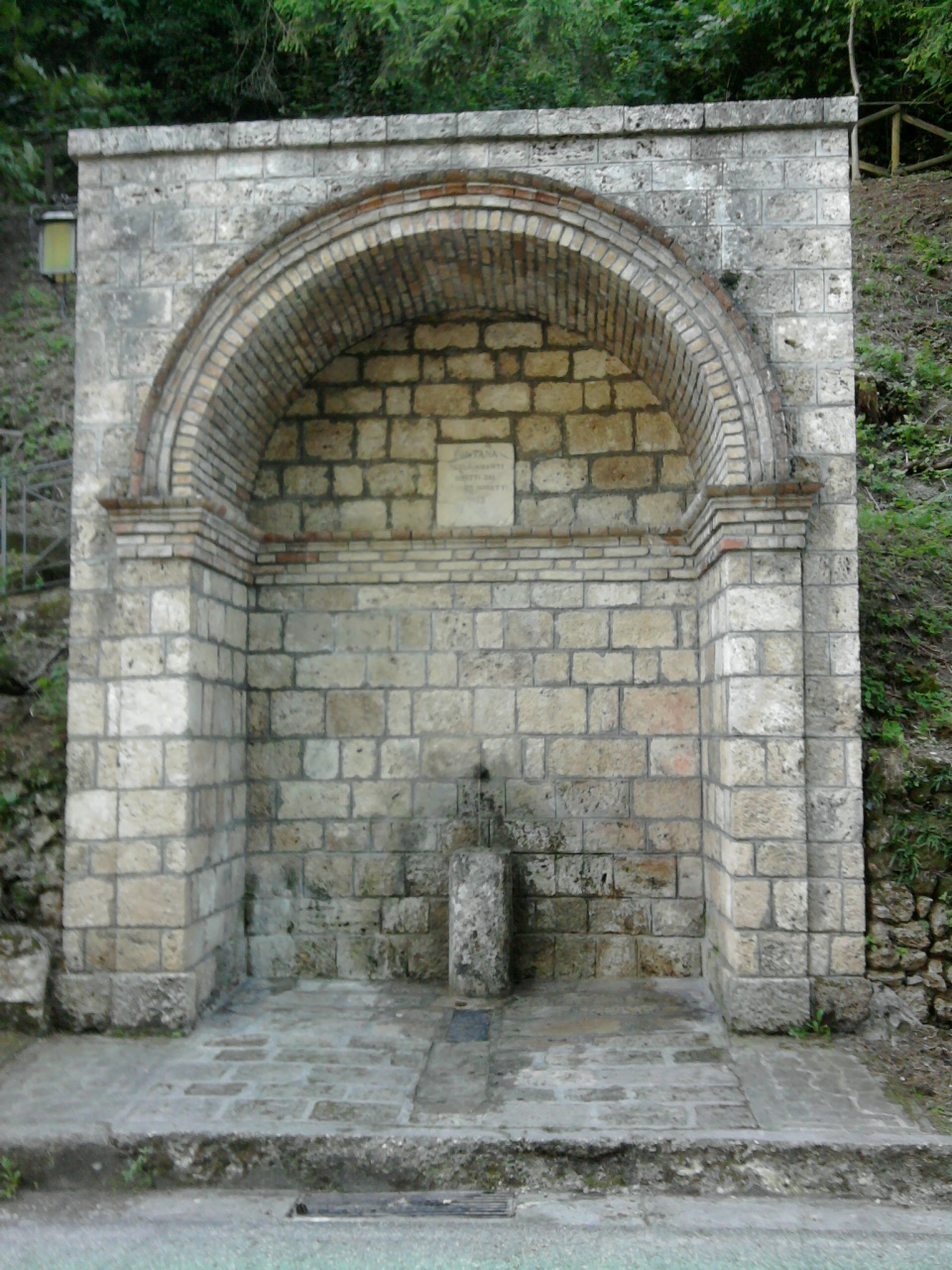 Antica Fontana degli amanti, costruita nel 1863.